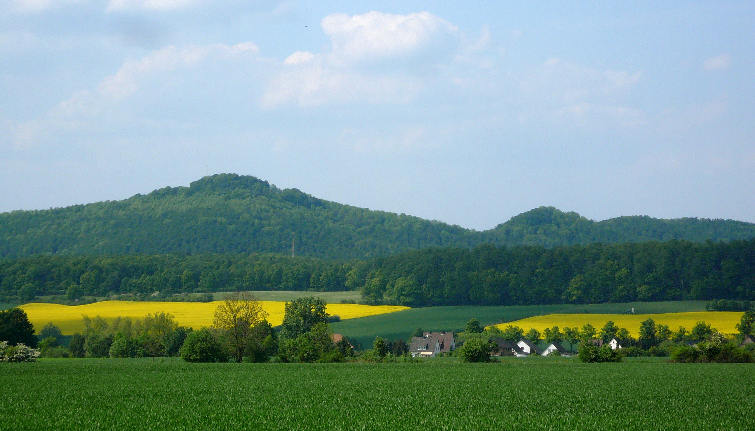 Großer Everstein (höchste Erhebung, links) und Kleiner Everstein (zweithöchste Erhebung, rechts davon). Blick von Südosten vom Heidbrink über Arholzen.